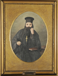 Ηγούμενος Γαβριήλ (Γεώργιος Μαρινάκης), έργο αγνώστου, ελαιογραφία σε μουσαμά, 25,5 Χ 18,5 εκ. (3430) Εθνικό Ιστορικό Μουσείο.